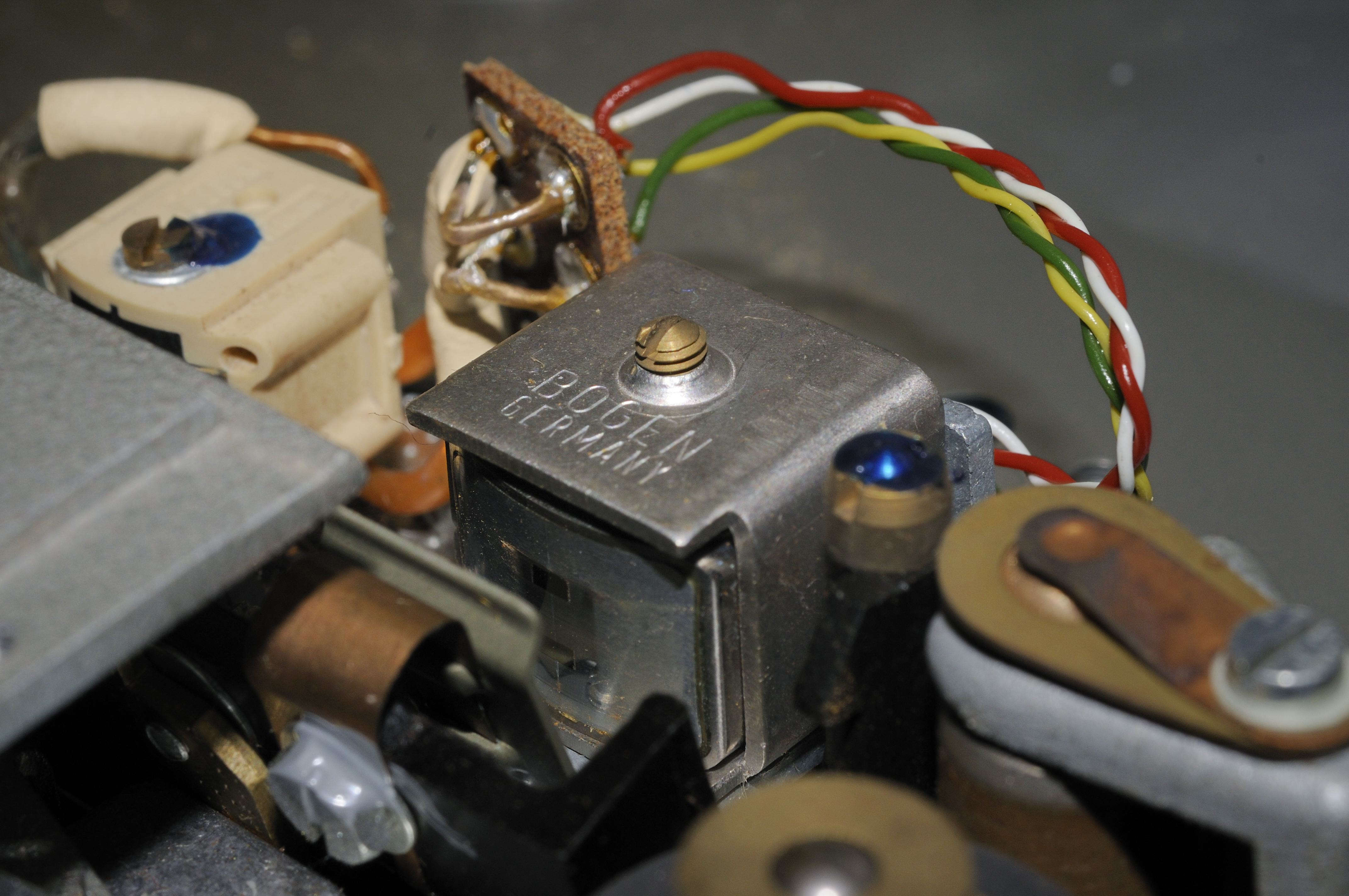 Tounkapp vum Uher 4400 Stereo Tounbandapparat. Tounkäpp vum UHER 4400 Report Stereo IC; an der Mëtt de Kombikapp, lénks uewen am Bild de Läschkapp